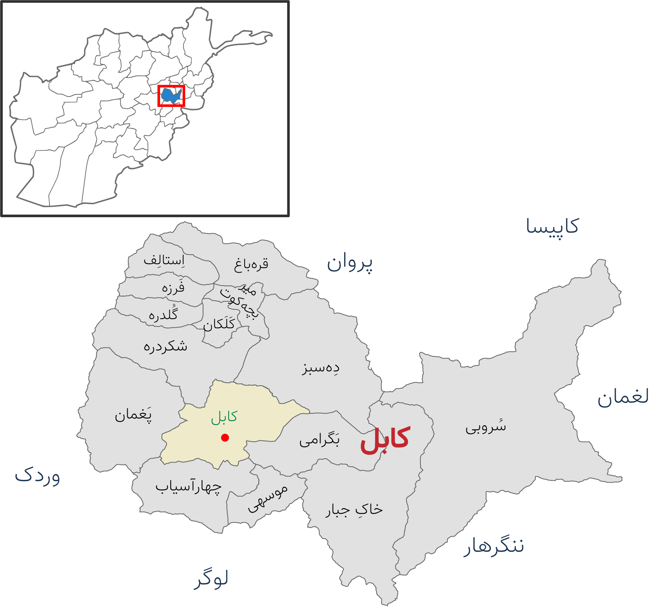 نقشه ولایت کابل